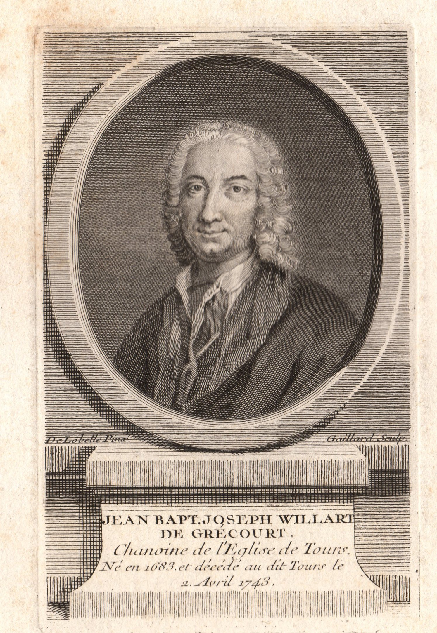 scan d'une gravure représentant Jean-Baptiste Joseph Willart de Grécourt.